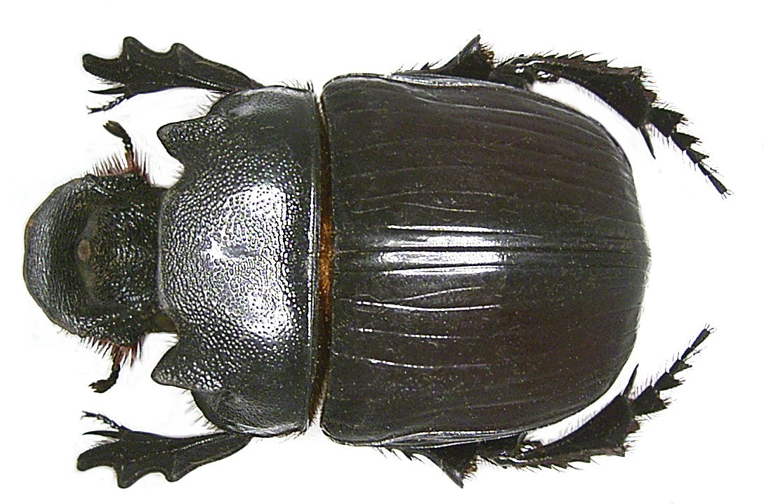 Familie: Scarabaeidae Grösse: 38-67 mm Verbreitung: Westafrika, Ostafrika, Zentralafrika Fundort: Zaire, Beni leg. R.Ducarme, 1983; det. U.Schmidt Foto: U.Schmidt, 2006